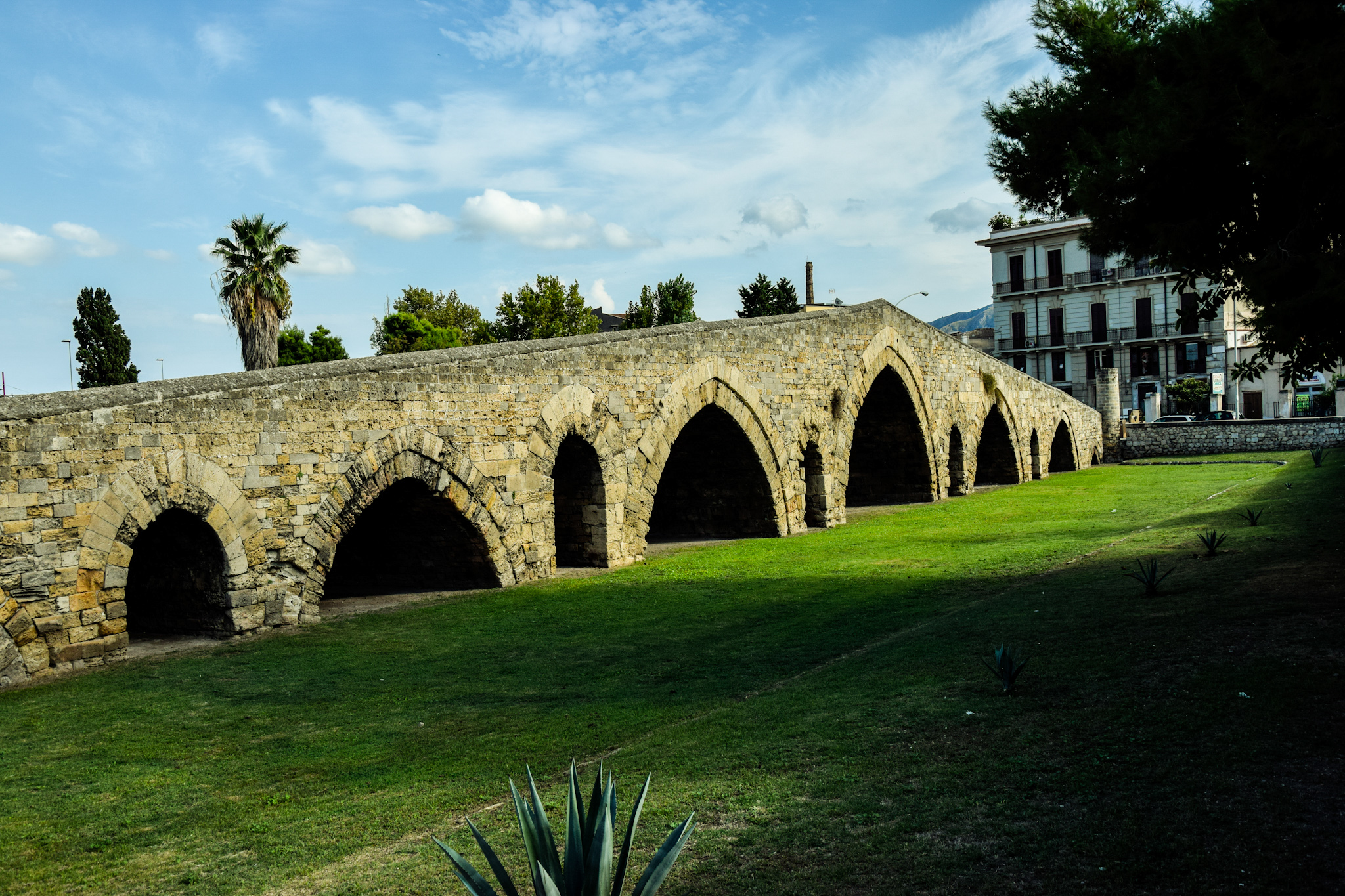 Ponte dell'Ammiraglio This is a photo of a monument which is part of cultural heritage of Italy.